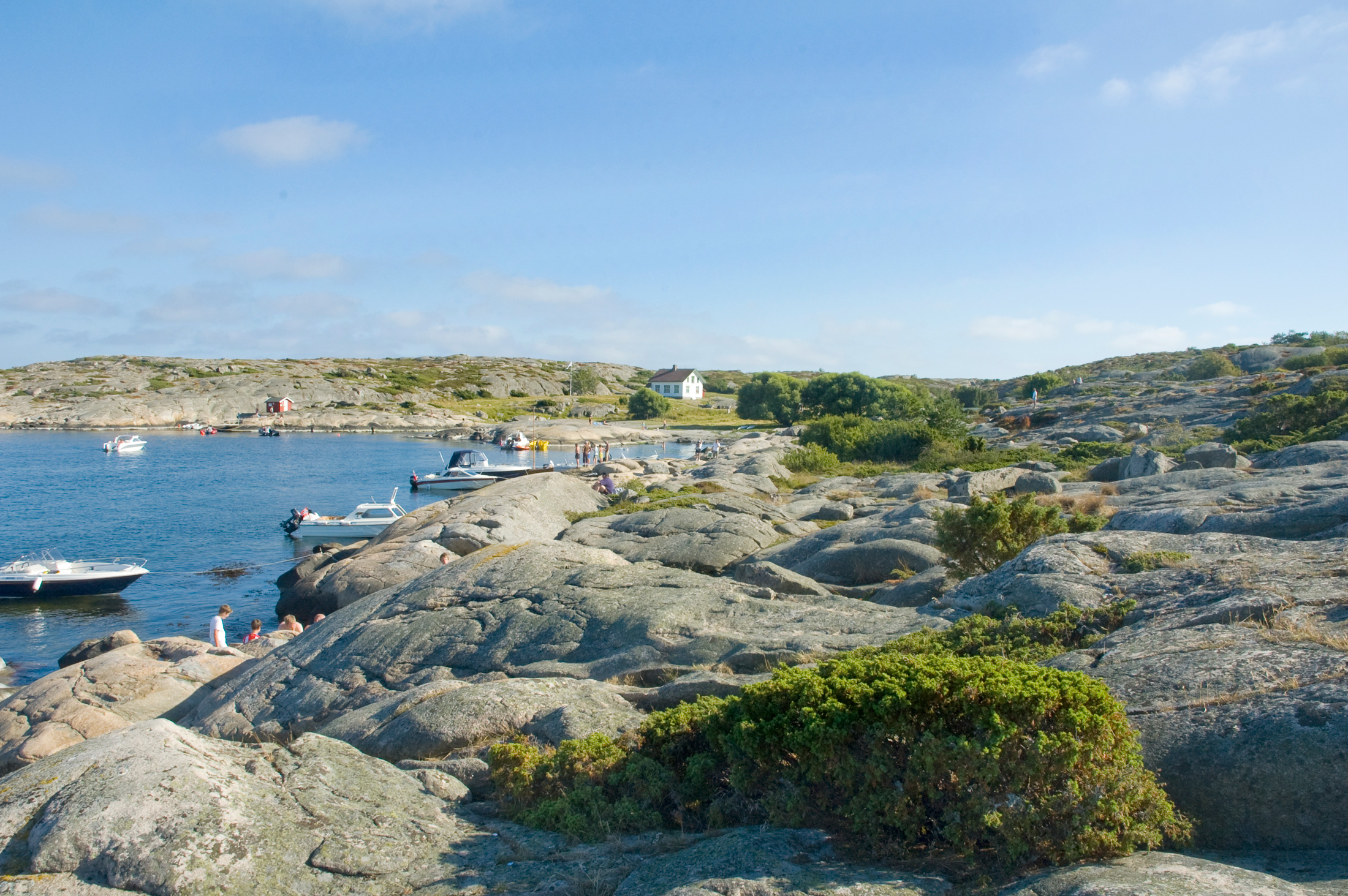 Parti fra Akerøya